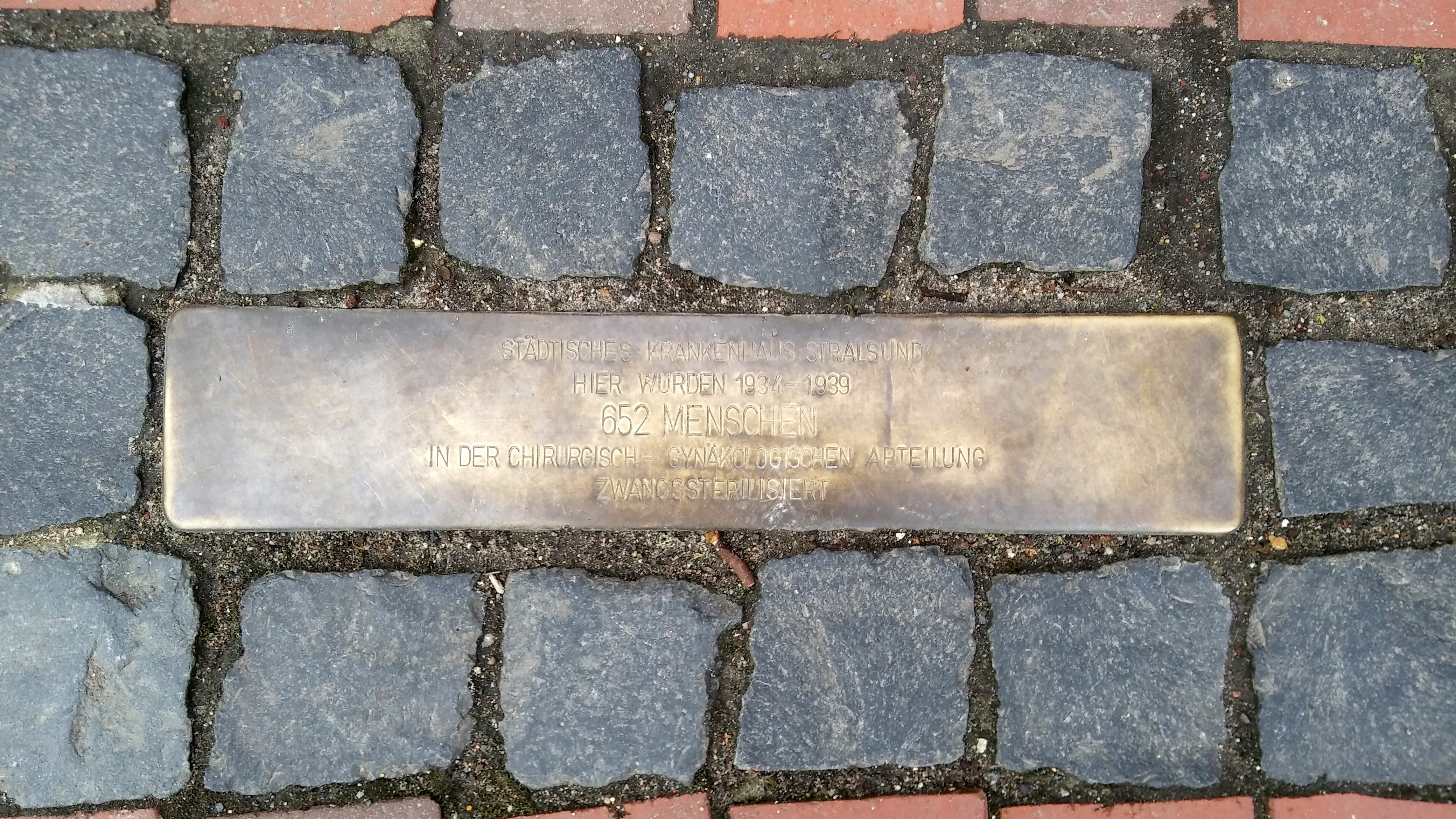 Stralsund, Marienstraße 2-4, Stolperschwelle (2017-02-22)